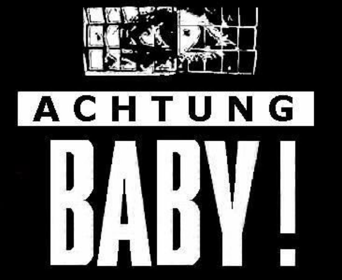 Логотип проекта "Achtung Baby!"